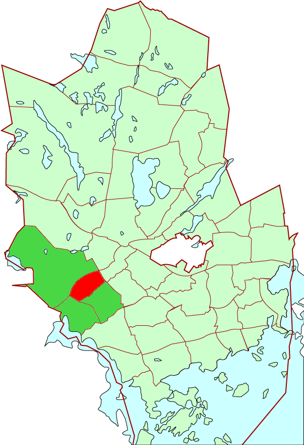 Kauklahti/Köklax district in Espoo city, Finland